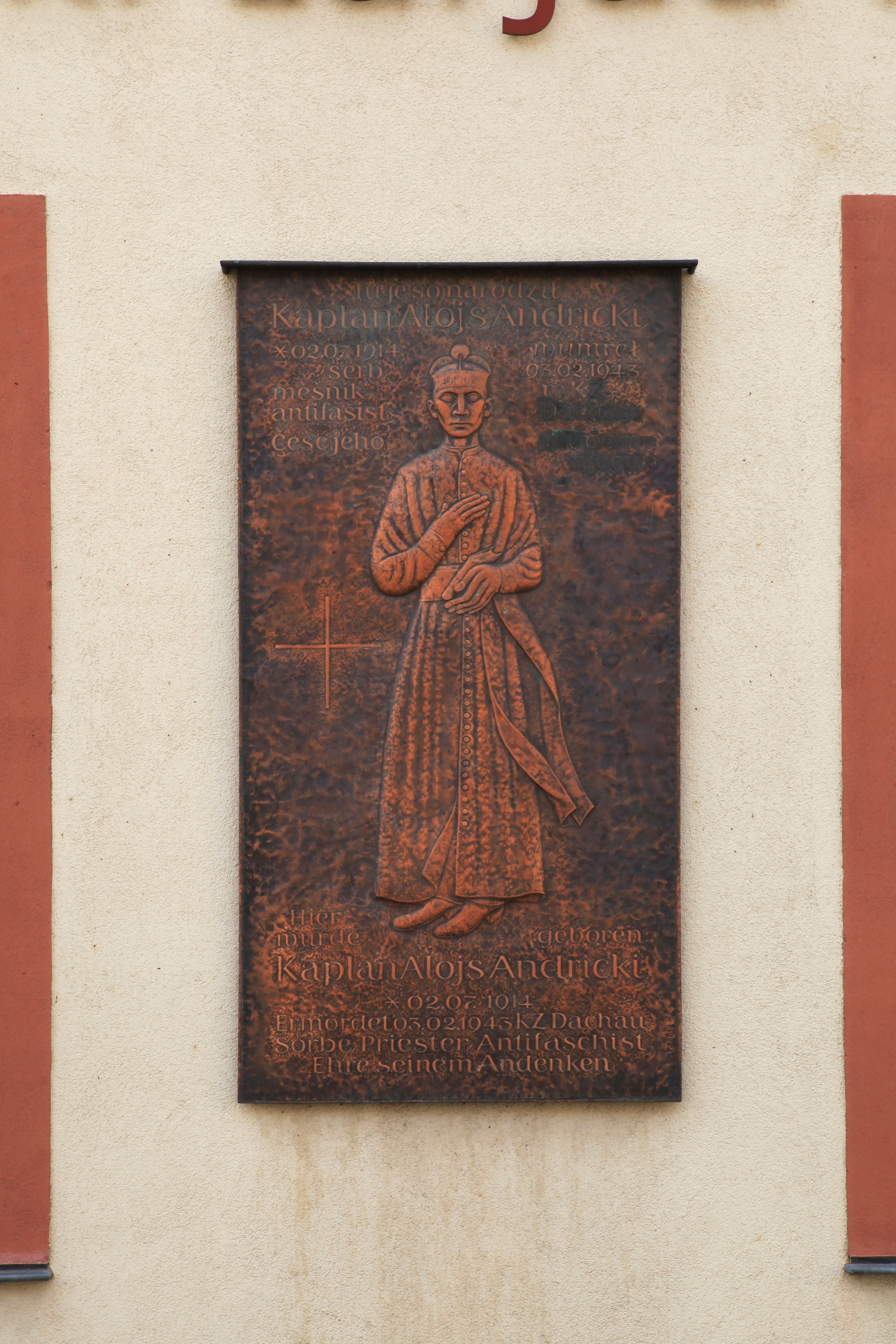 Gemeindeamt, Alois-Andritzki-Straße 2 in Radibor Hornjoserbsce: Wopomnjenska tafla za Alojsa Andrickeho při gmejnskim zarjadnistwje w Radworju